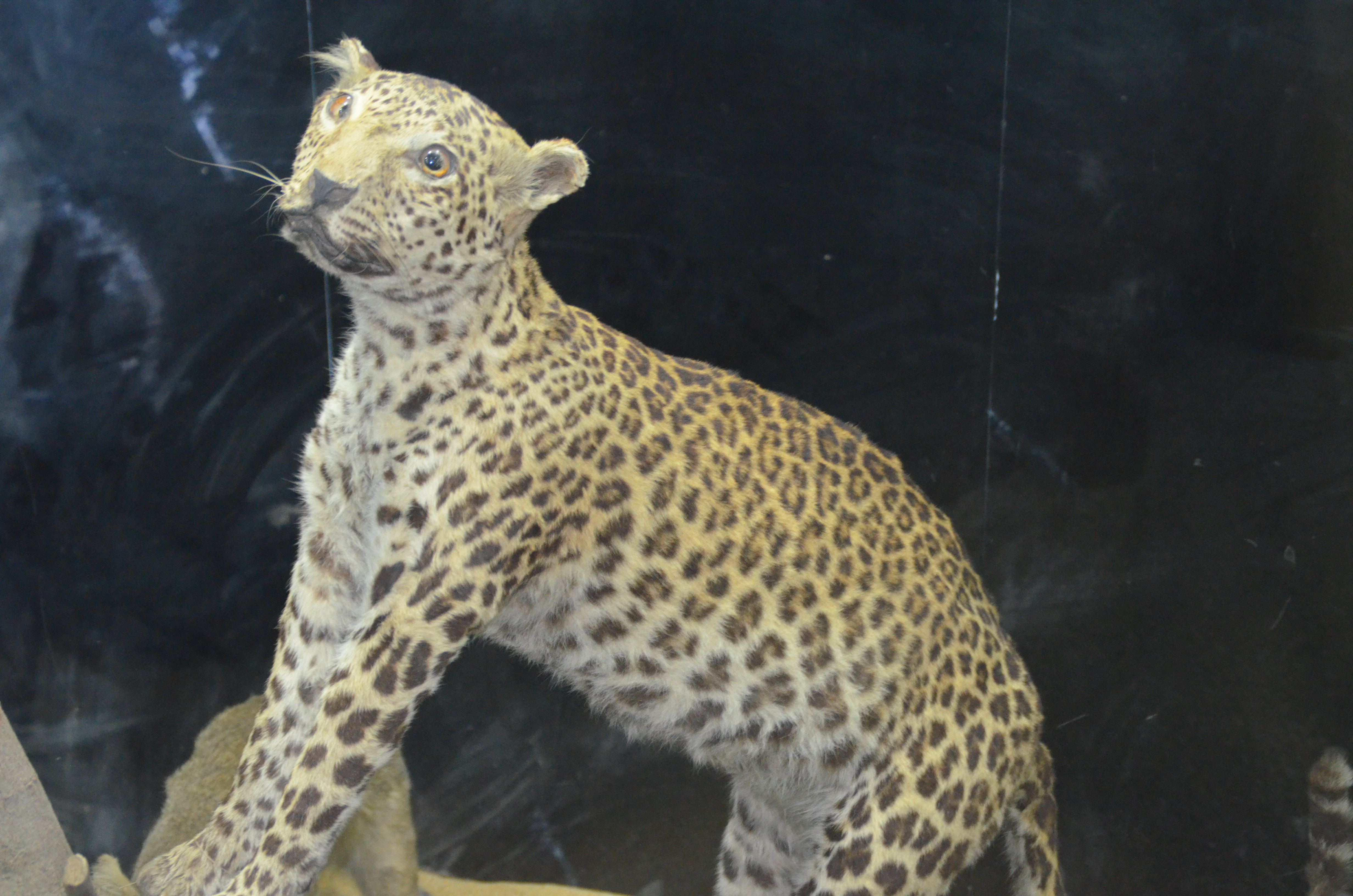 المتحف الحيواني بحديقة حيوان الجيزة